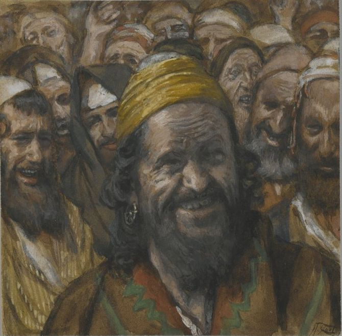 Barabbas